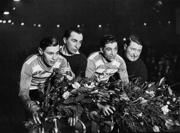 Vel'd'Hiv': de gauche à droite : Guimbretière, Broccardo vainqueur américain (2h) : [photographie de presse] / Agence Meurisse